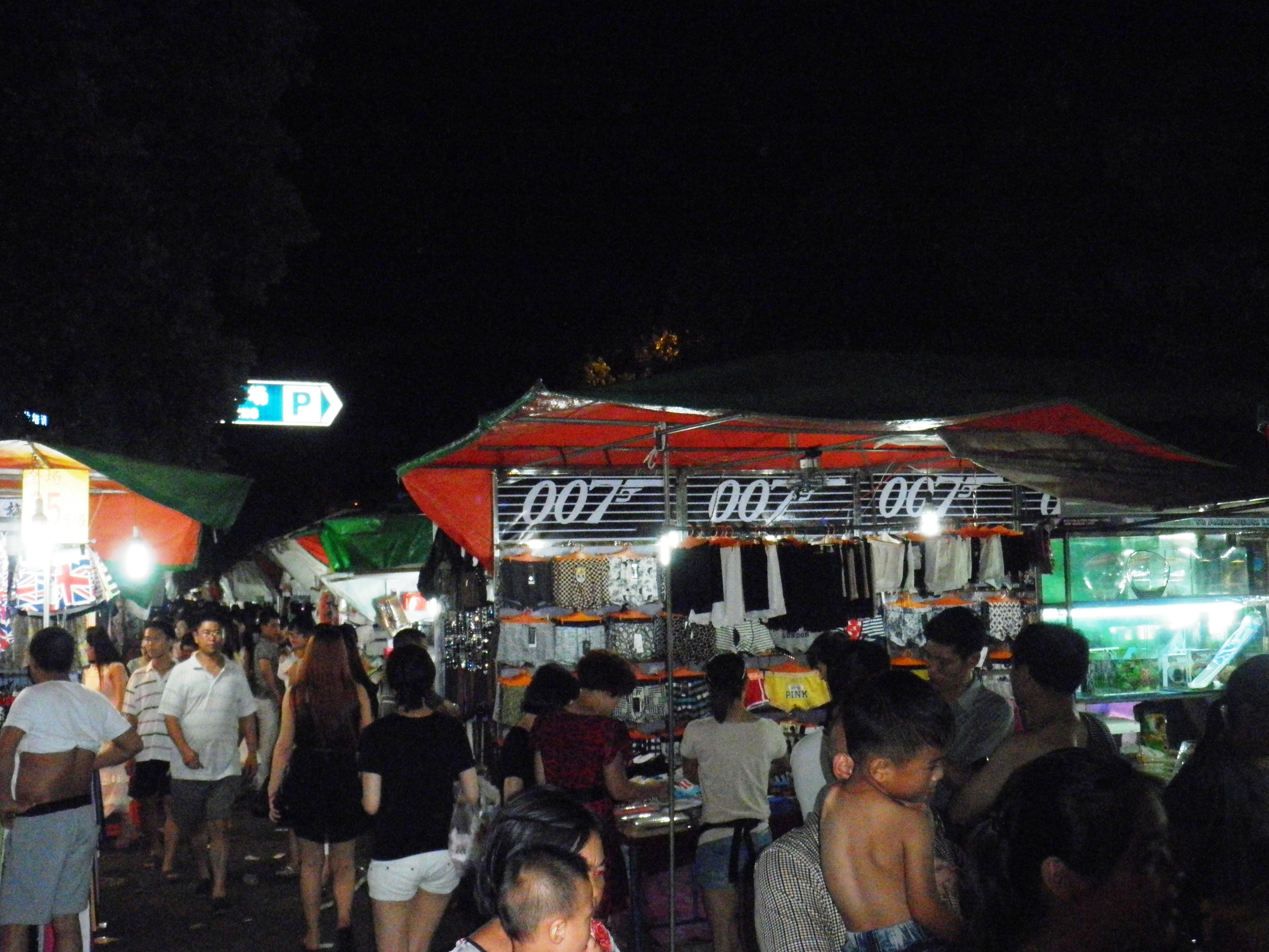 Yiwu night market